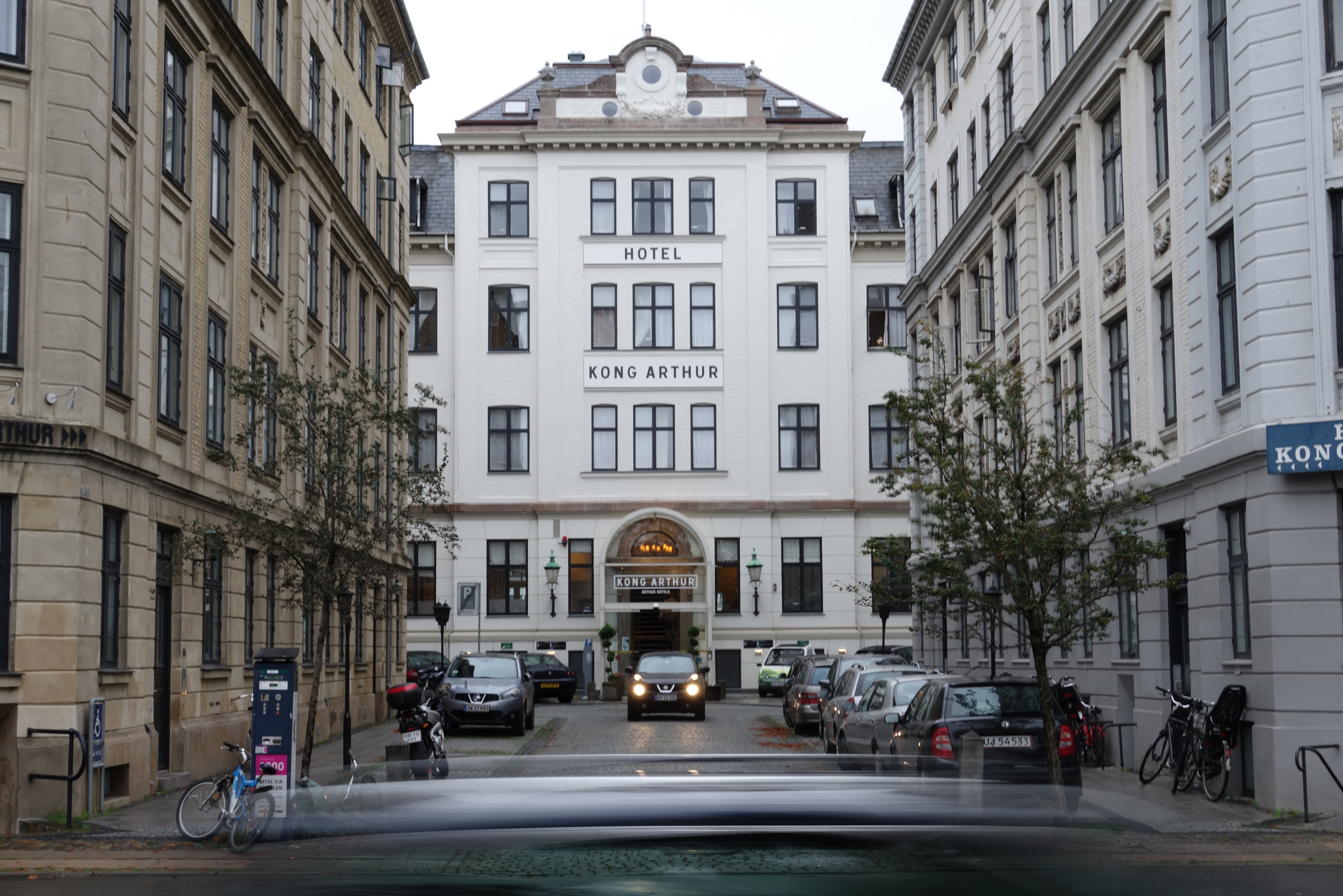 Hotel Kong Arthur in Copenhagen, Denmark